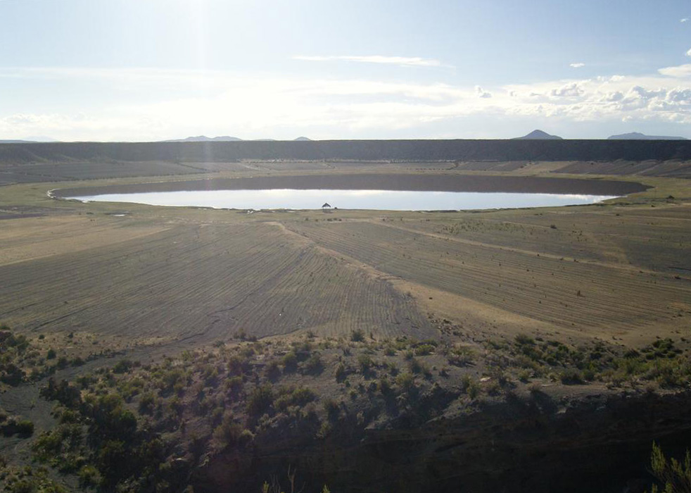 Crater de Jayu Kuta o Jayu Quta, Altiplano de Bolivia